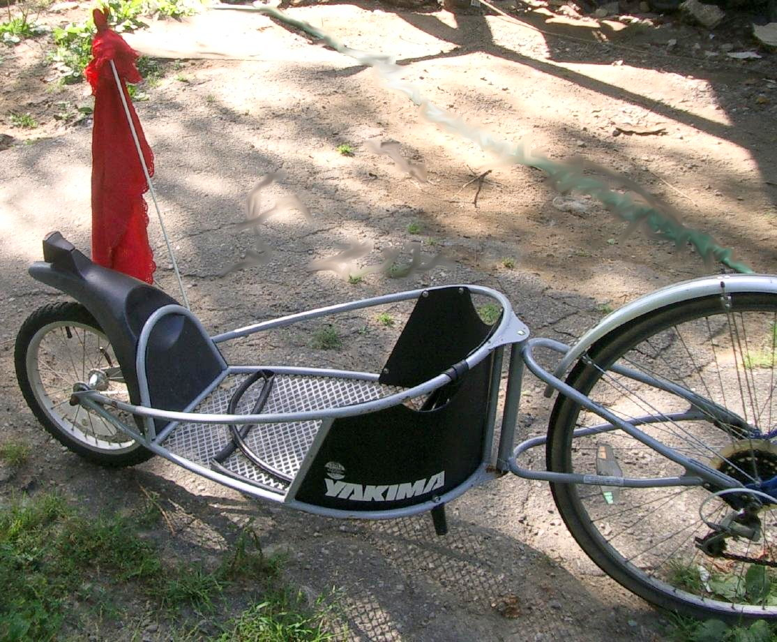 Yakima Bicycle Trailer